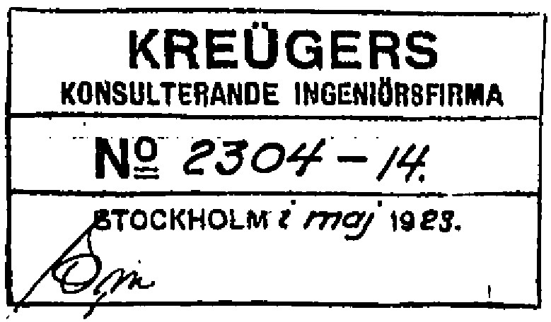 Konserthuset, K-ritning, ritningsstämpel, Kreügers konsulterande ingenjörsfirma.